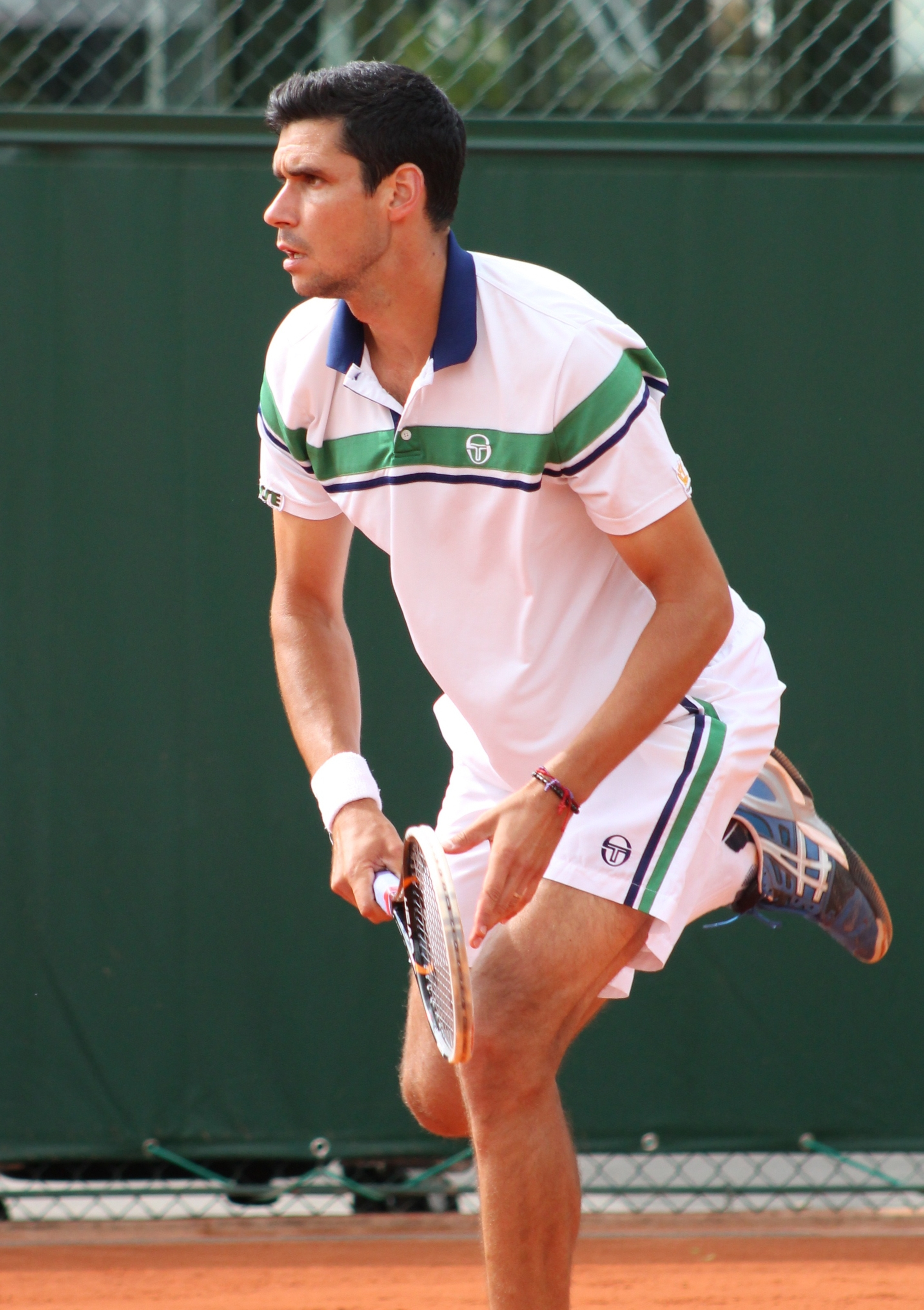 Hanescu RG13 (15)